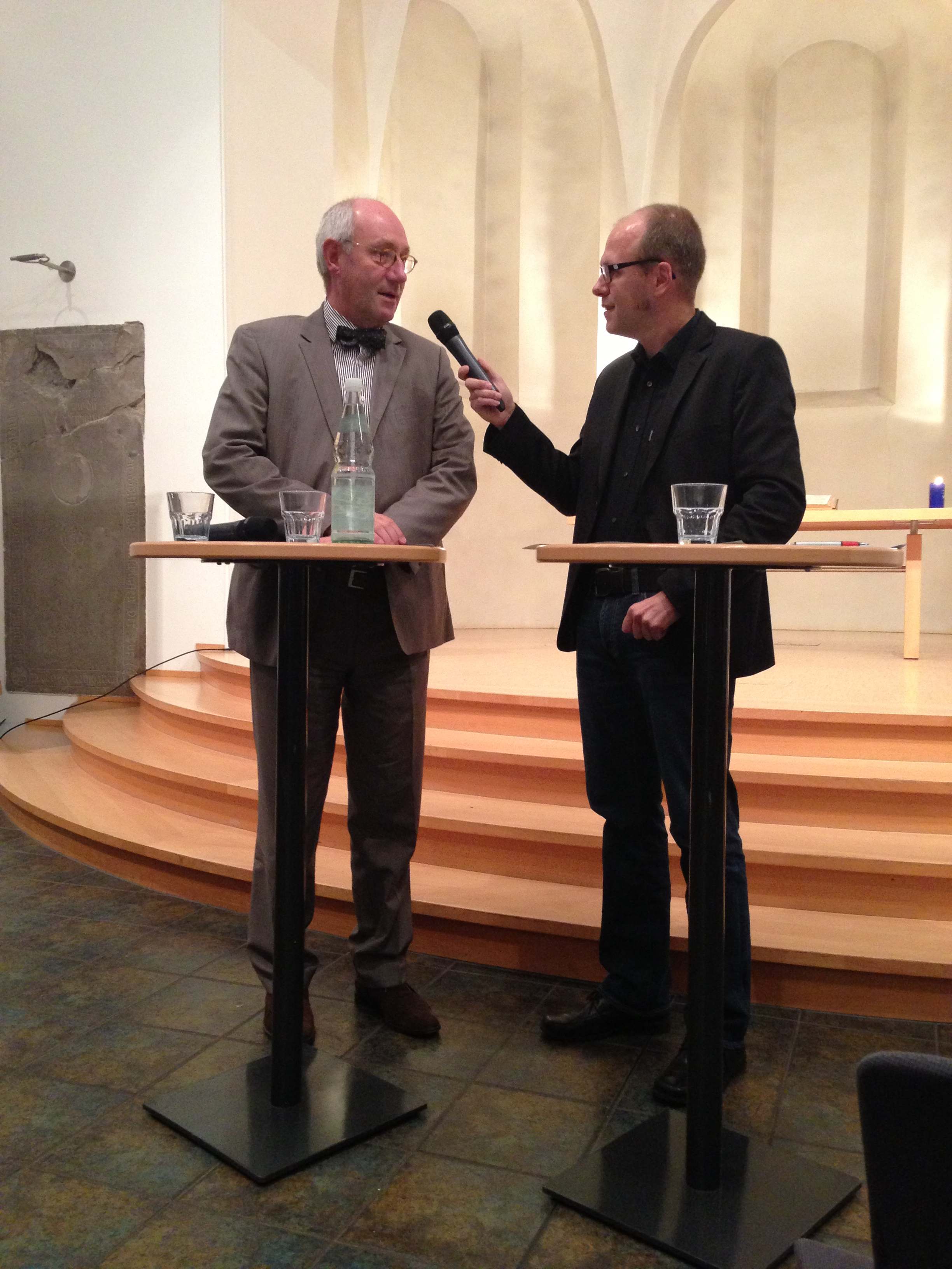 Moderator Christian Spoo (Radio Wuppertal, rechts) und Dr. Johannes Slawig (Stadtdirektor von Wuppertal, links) auf der öffentlichen Bürgerdiskussion zum städtischen Haushalt am 17. September 2013 in der City-Kirche Elberfeld, Wuppertal }